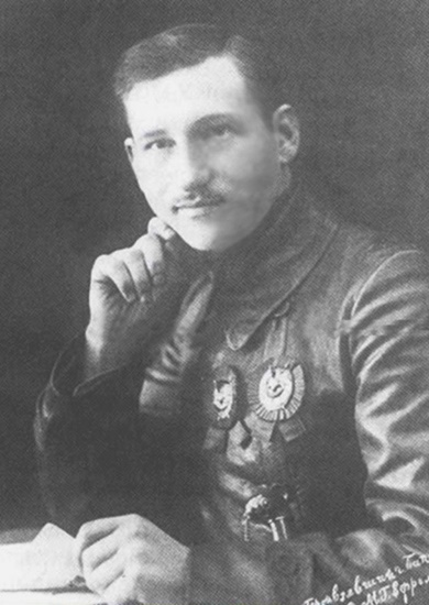 Михаил Григорьевич Ефремов (1897 — 1942) — советский военачальник. Баку. 1920 г.